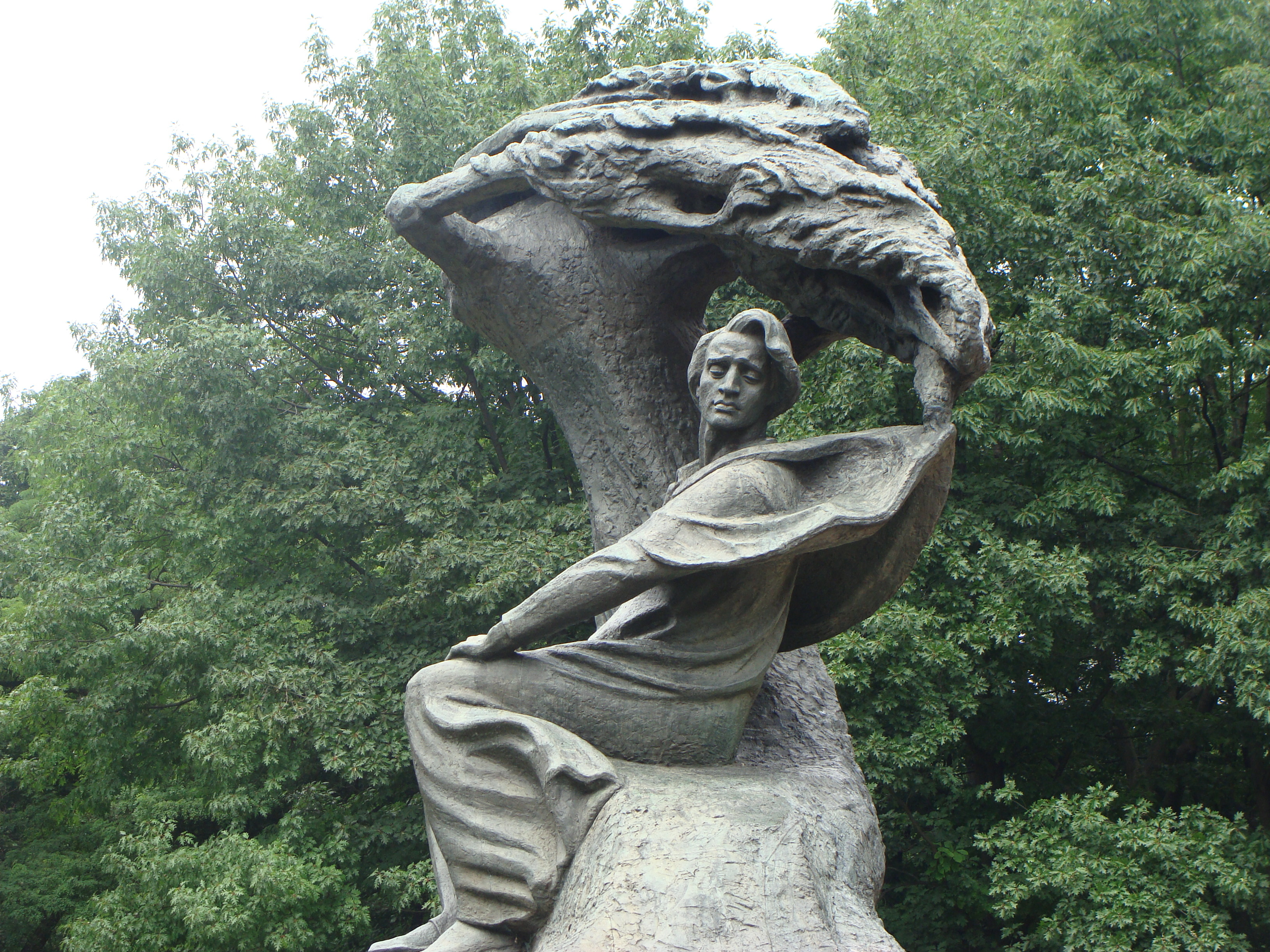 Το Μνημείο του Σοπέν στο Πάρκο Λαζιένσκι της Βαρσοβίας.